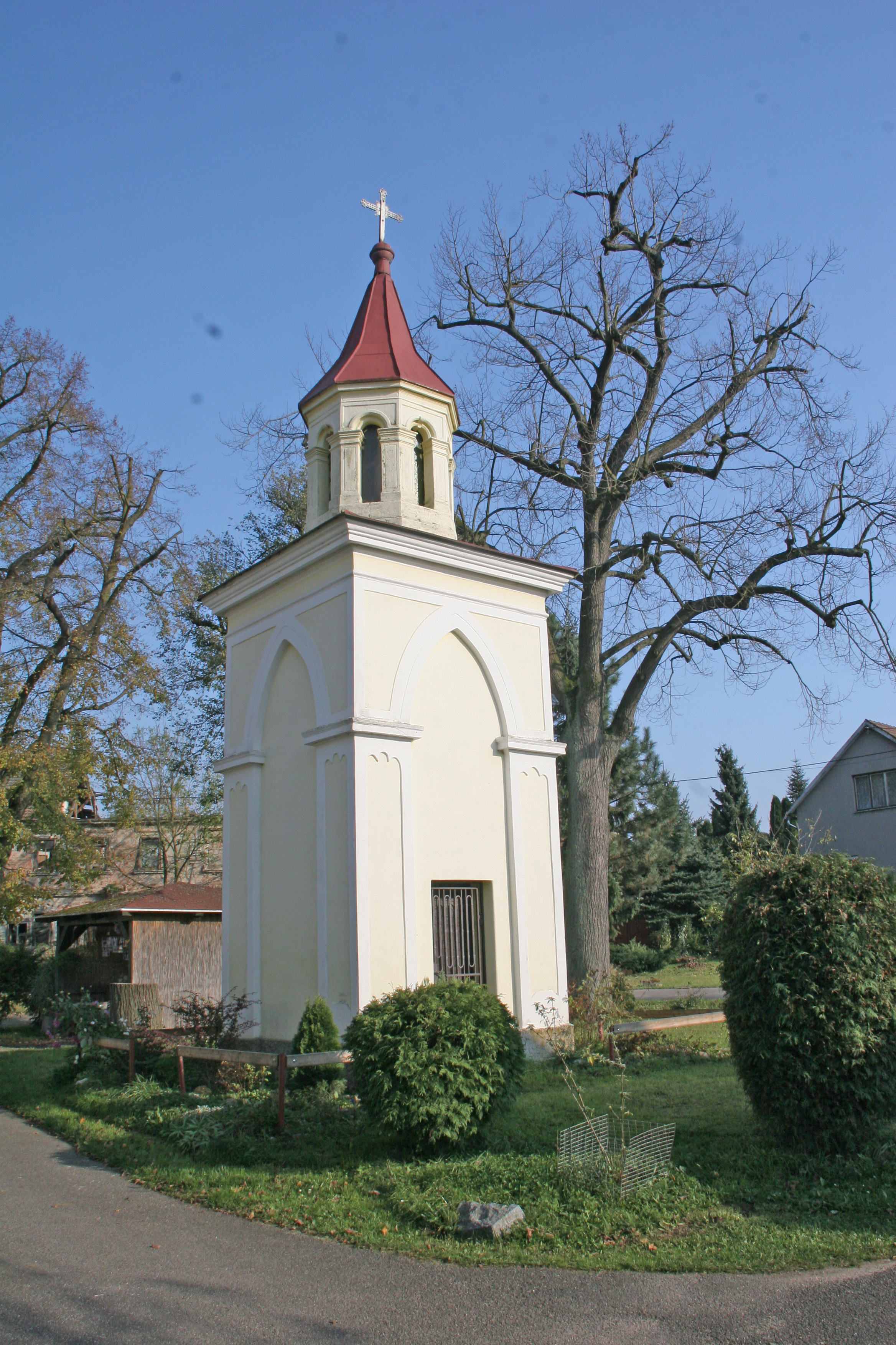 Janovičky kaple